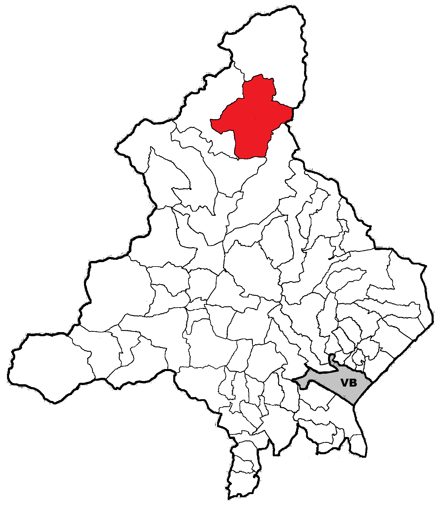 Posizione del comune nella provincia del Verbano Cusio Ossola (Verbania)